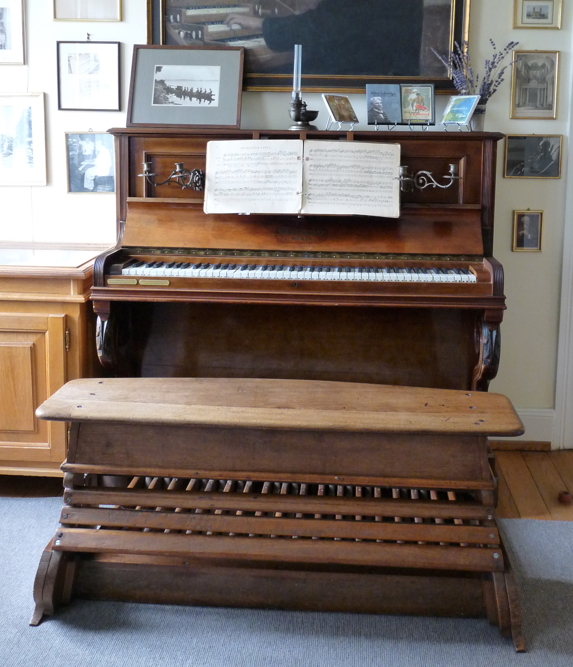 Musée Albert Schweitzer à Gunsbach (Haut-Rhin). Piano à pédalier d'orgue spécialement réalisé pour A. S.